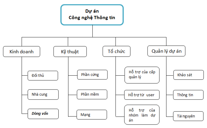 Cấu trúc chia nhỏ rủi ro của một dự án công nghệ thông tin (risk breakdown structure of IT project)